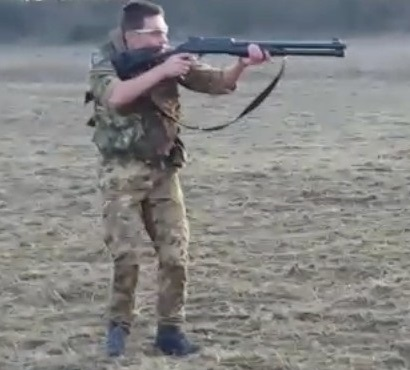 Alpino italiano armato di un fucile a canna liscia semi automatico calibro 12 in addestramento